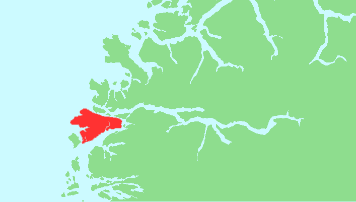 Locator map of Bremangerlandet, Sogn og Fjordane, Norway